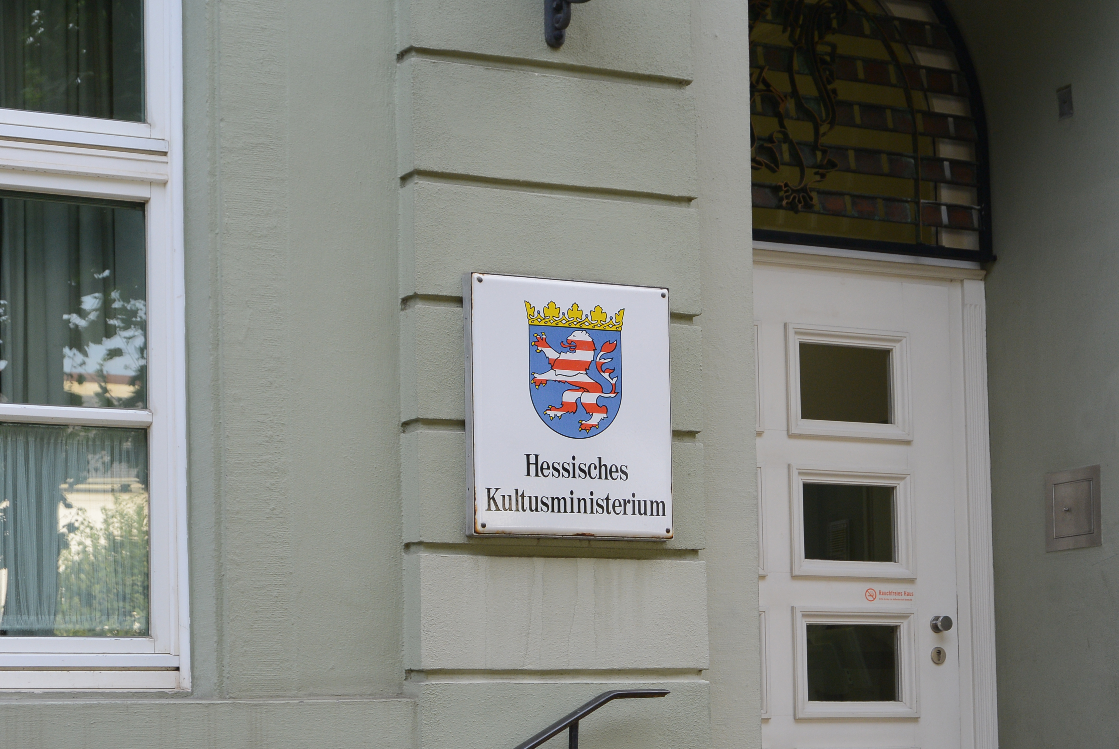 Emailleschild am Eingang des Hessischen Kultusministeriums, mit Landeswappen und Schriftart "Bodoni".